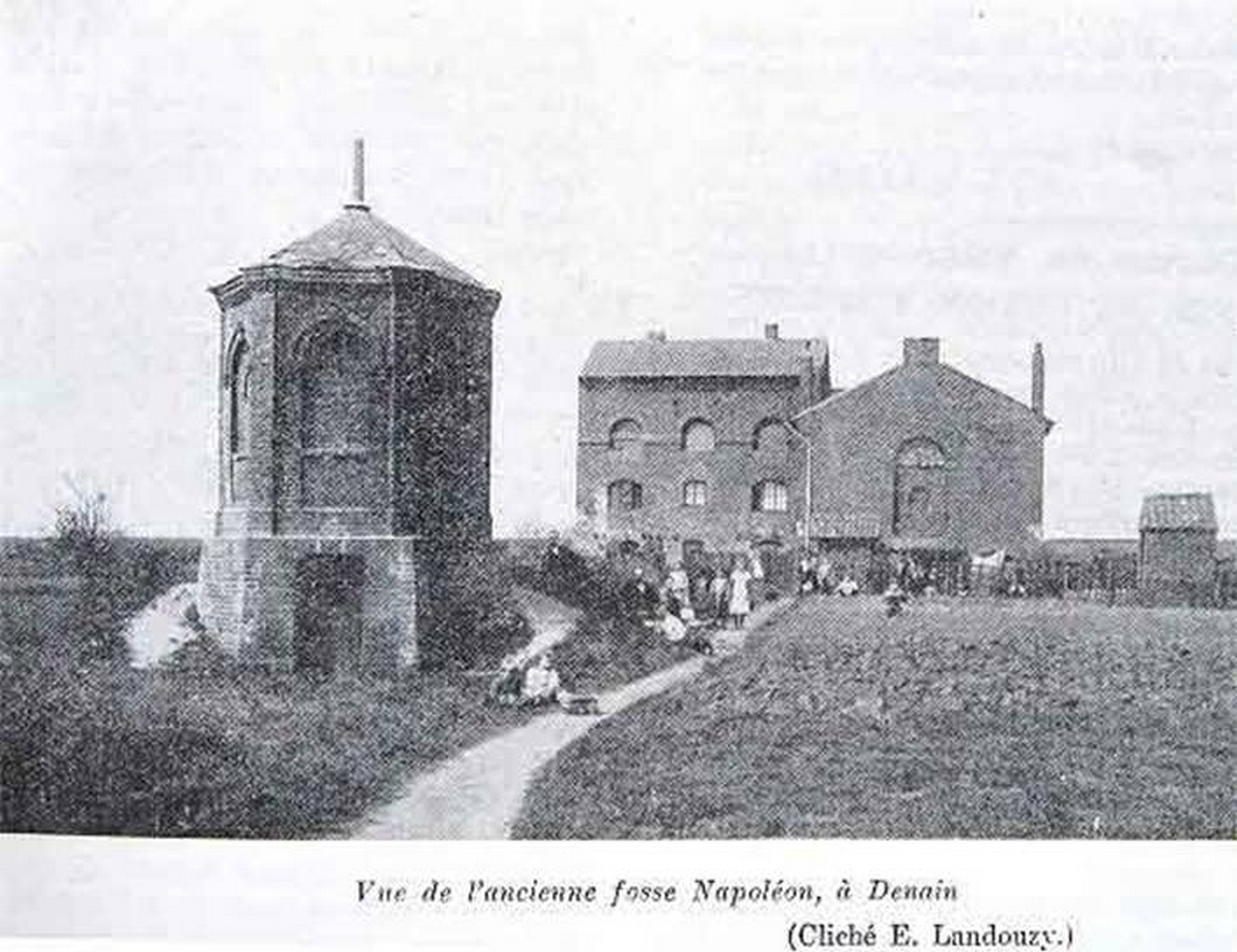 La fosse Napoléon de la Compagnie des mines d'Anzin était un charbonnage constitué d'un seul puits situé à Denain, Nord, Nord-Pas-de-Calais, France.